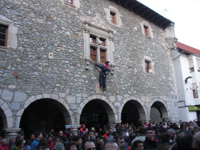 Bielsa